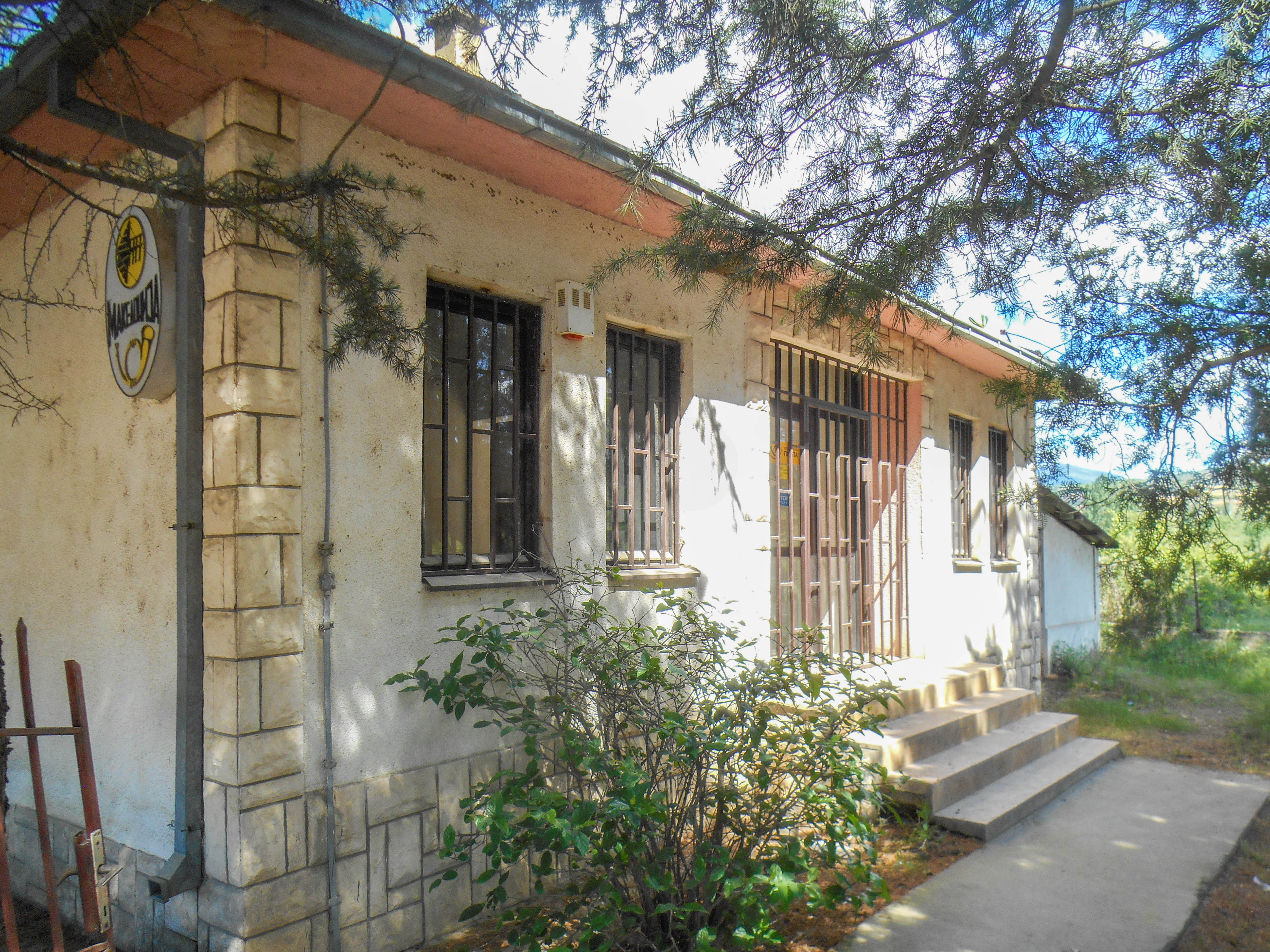 Пошта - Доброшинци